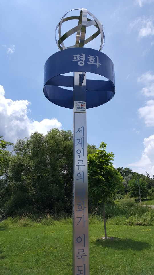 군포시와 벨빌시 간의 평화의 봉이다. 이 봉은 벨빌시에 위치해있다.